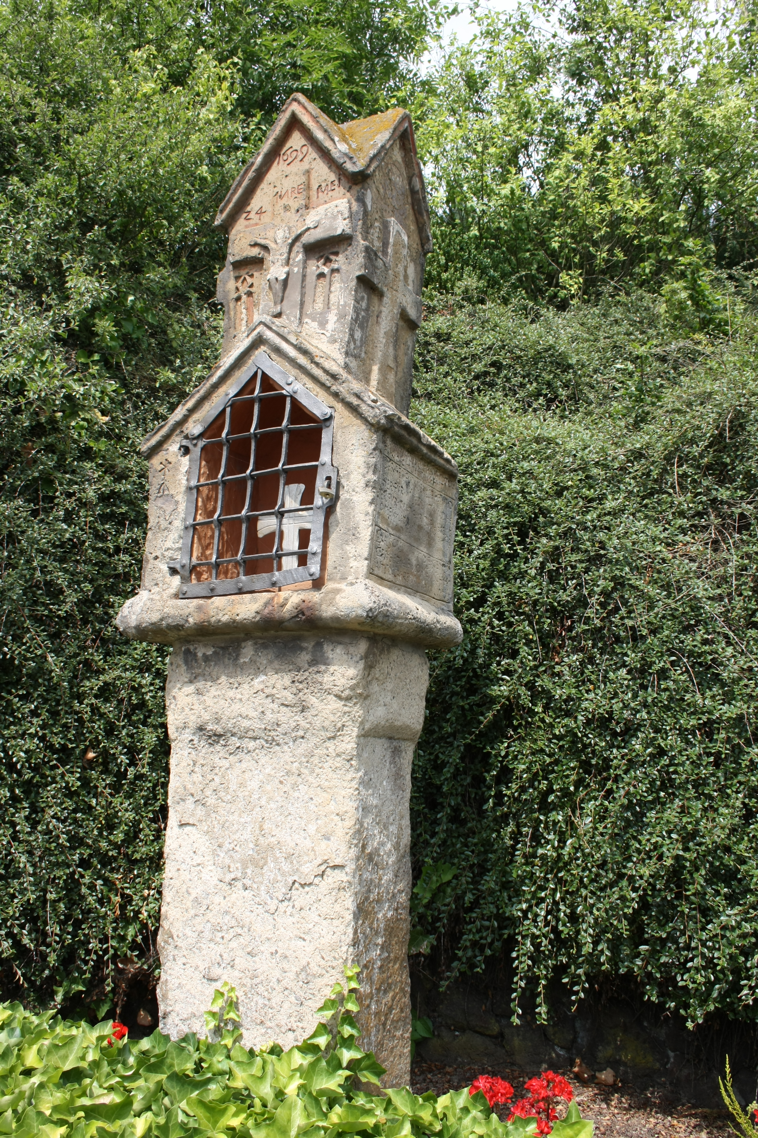 Bildstock in Niederdürenbach, bez. 1699, Brohltalstraße/Ecke Ernteweg